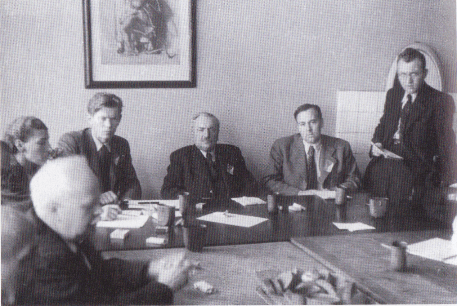 Česká národní rada (ČNR) byl ilegální odbojový orgán sdružující domácí rezistenční organizace. Vznikl v únoru 1945, fungoval prakticky až do konce druhé světové války, měl teritoriální působnost po celém protektorátu a jeho funkcí bylo vystupovat jako jednotící element ve vztahu k zahraničnímu odboji. ČNR významně koordinovala Pražské květnové povstání 1945. Záběr z jednání ČNR datovaný na první dekádu května 1945. Zleva doprava: architektka Augusta Machoňová-Müllerová (* 1906 - 1984); historik umění profesor Zdeněk Wirth (* 1878 - 1961); politik a funkcionář KSČ Josef Smrkovský (* 1911 - 1974); český literární historik Prof. PhDr. Albert Pražák (* 1880 - 1956); právník a politik JUDr. Josef Cyril Kotrlý (* 1903 - 1973); voják a parašutista výsadku Platinium-Pewter kapitán jezdectva Jaromír Nechanský (* 1916 – 1950). Fotografie byla drobně digitálně retušována.